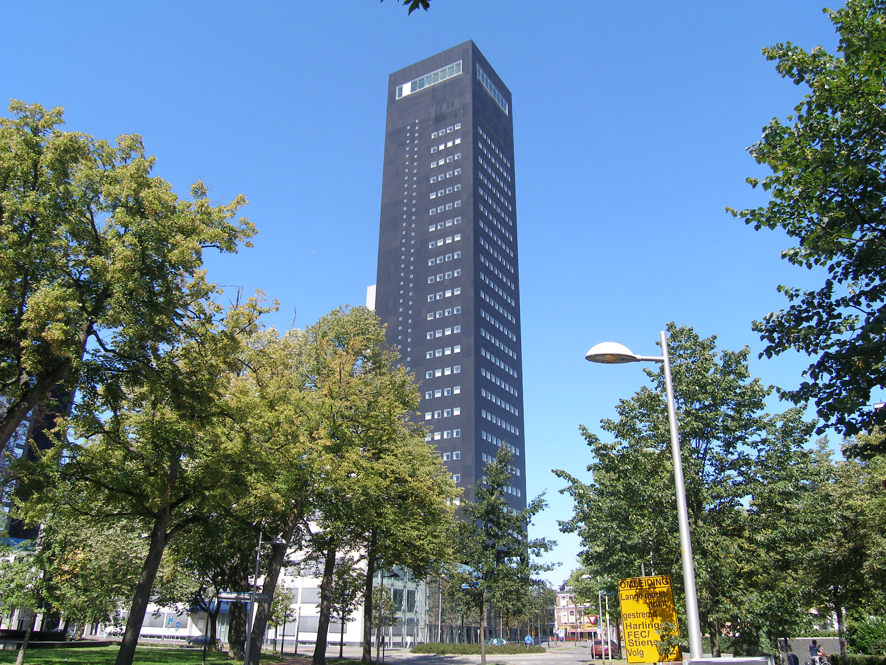 Achmeatoren in Leeuwarden, ontworpen door Abe Bonnema. Eigen werk maart 2006 Achmeatower in Leeuwarden, design of Abe Bonnema, Own work march 2006